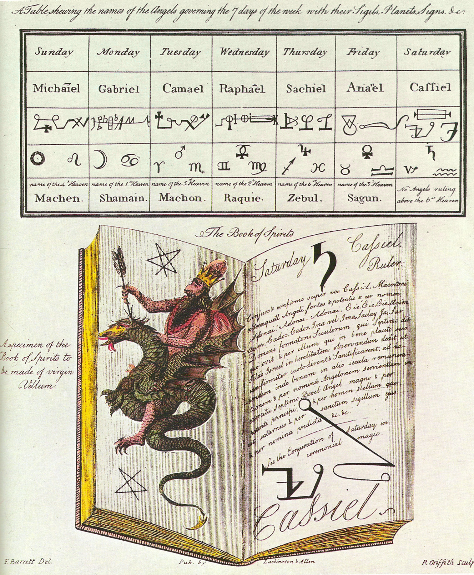 Kupferstich aus Francis Barretts "The Magus" (1801). Die sieben planetarischen Geister und das Buch der Geister. Namen: Michaiel, Gabriel, Camael, Raphael, Sachiel, Anael, Cassiel, Machen, Shamain, Machon, Raquie, Zebul, Sagun, Macator, Adonai, Eie, Acim, Cados, Ima, Seraquiel, Booel, Saturnus.